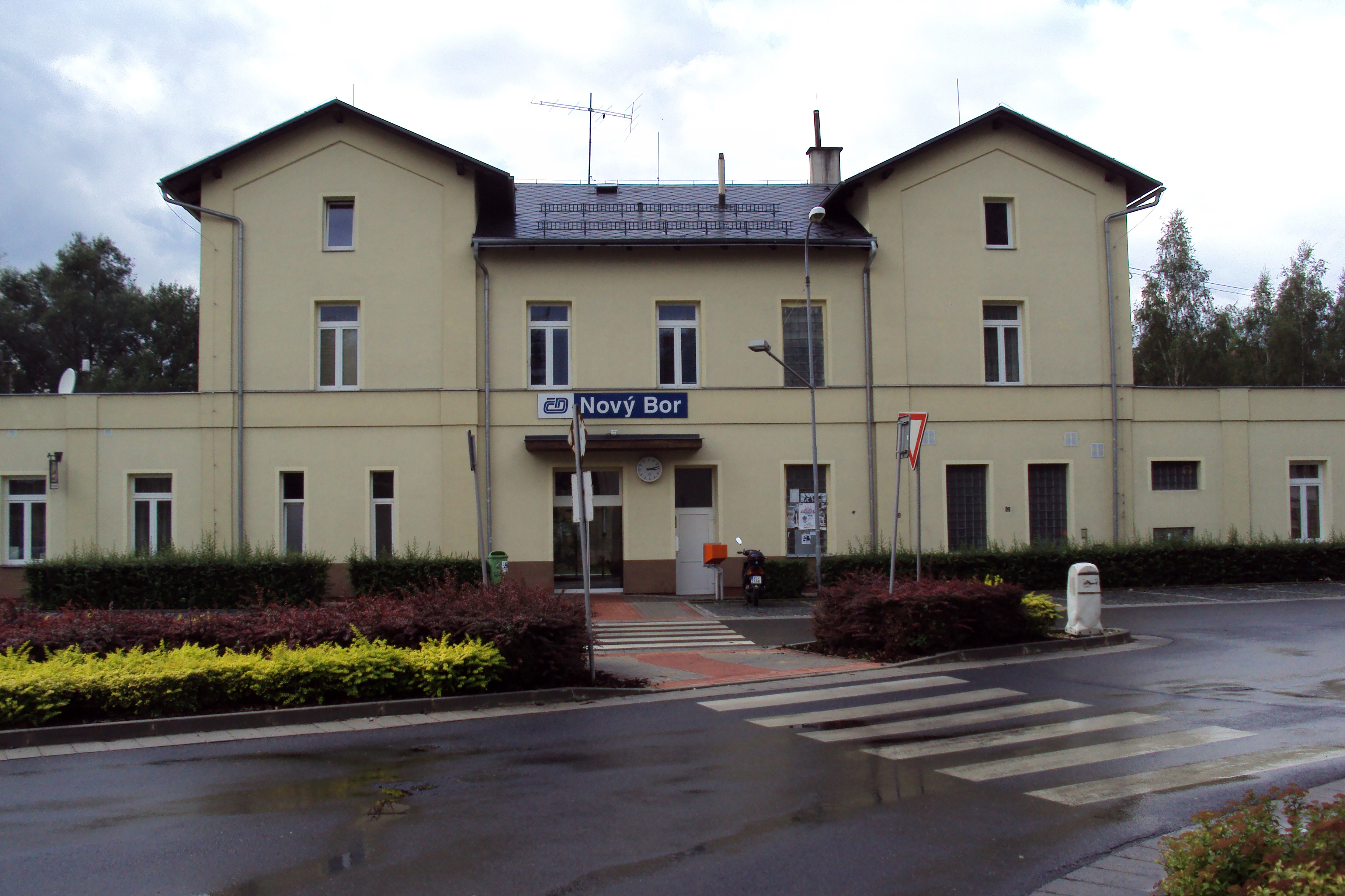 Hlavní vlakové nádraží zvenčí